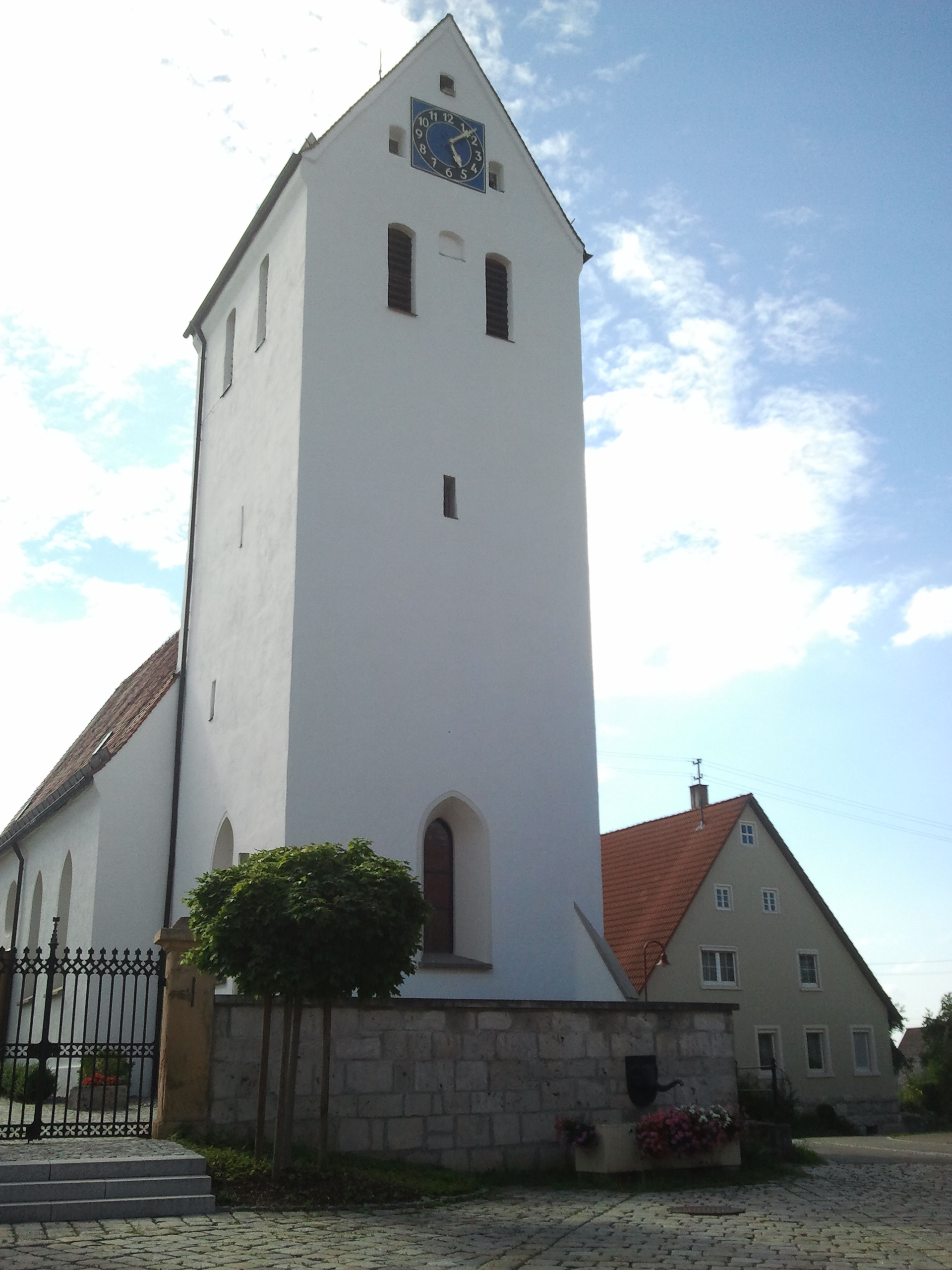 Johanneskirche Stubersheim nach der Renovierung 2013